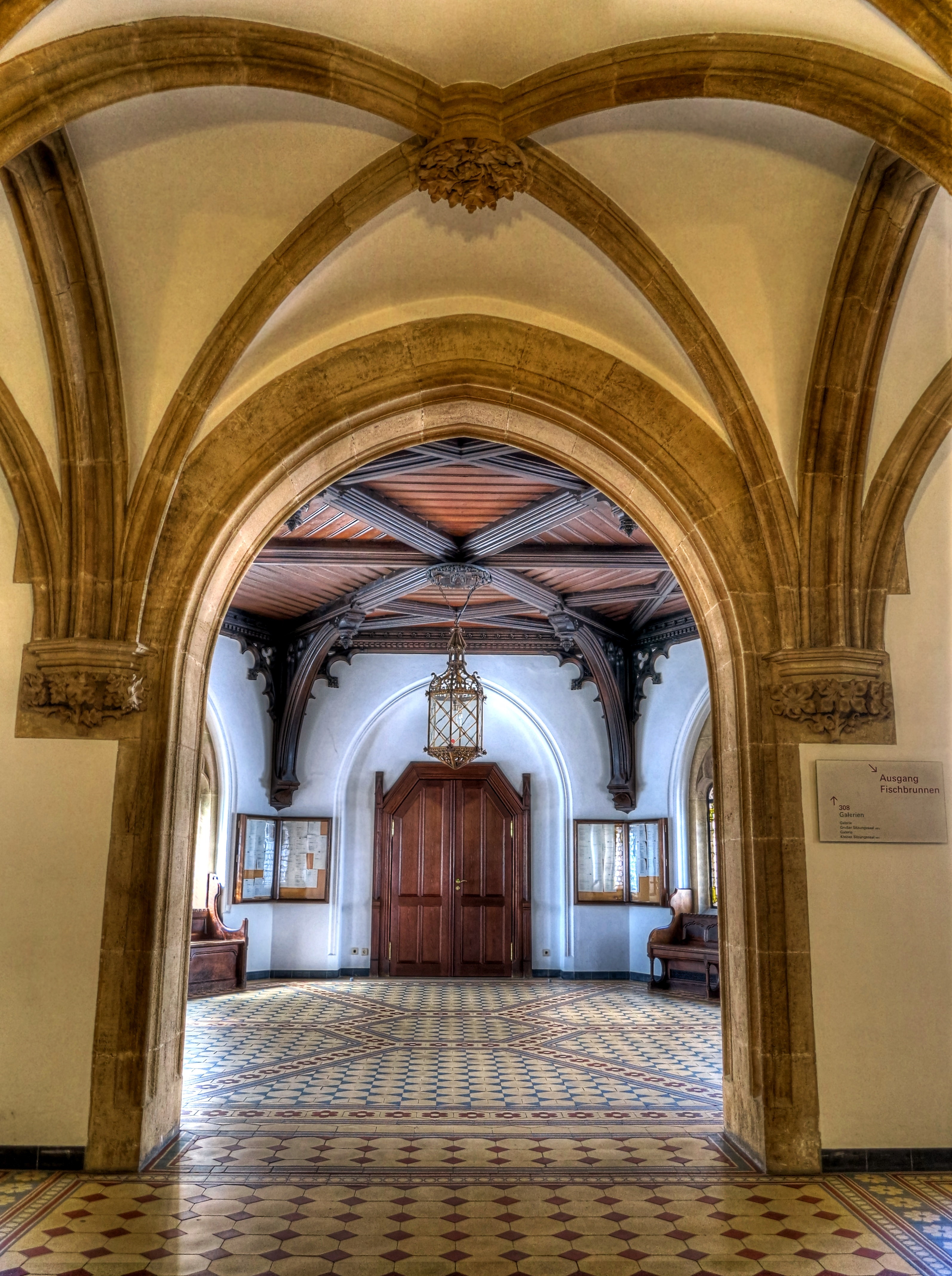 Deutschland, Bayern, Oberbayern, München, Neues Rathaus, Zugang zur Galerie des Großen Sitzungsaals